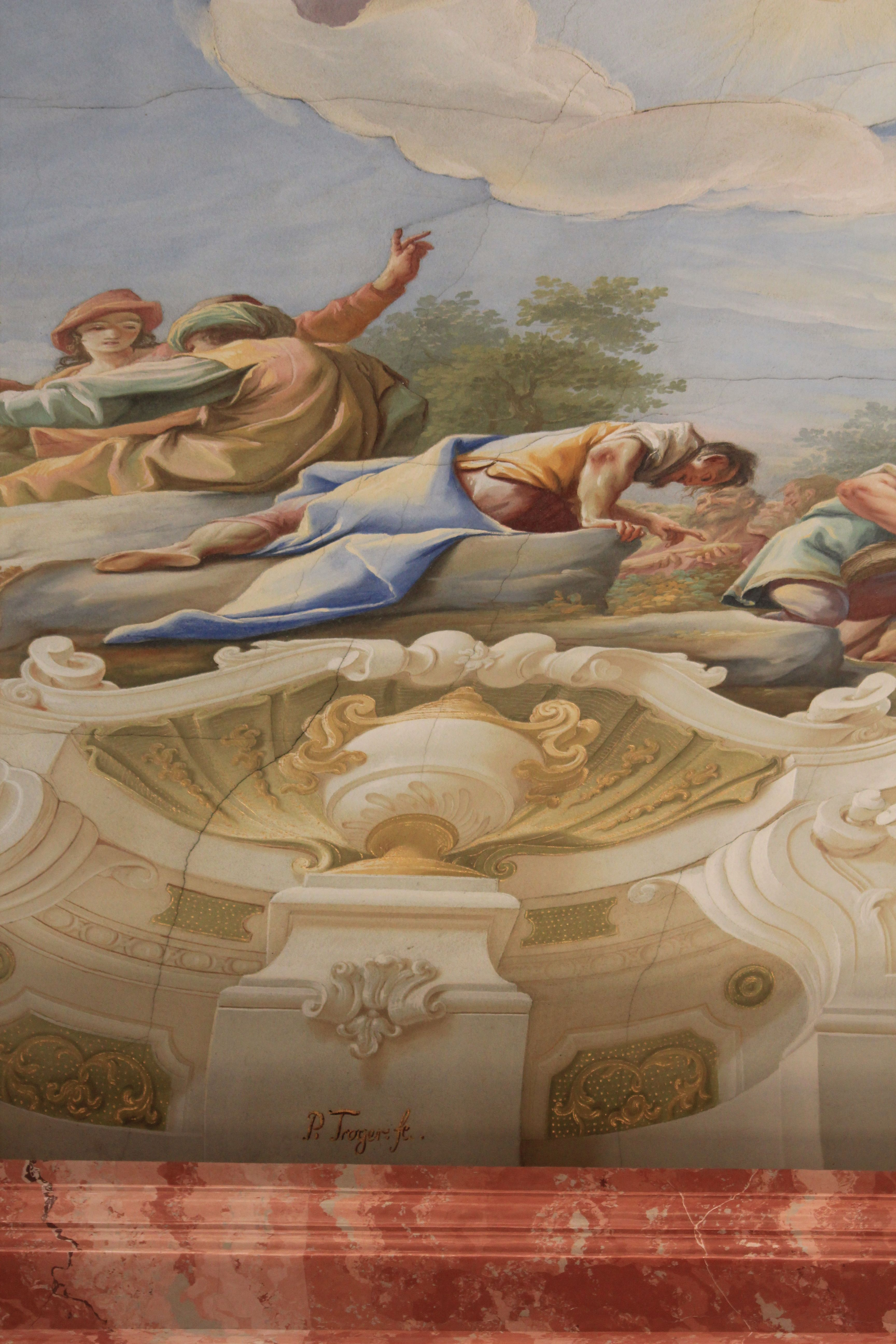 Signature: P. Troger